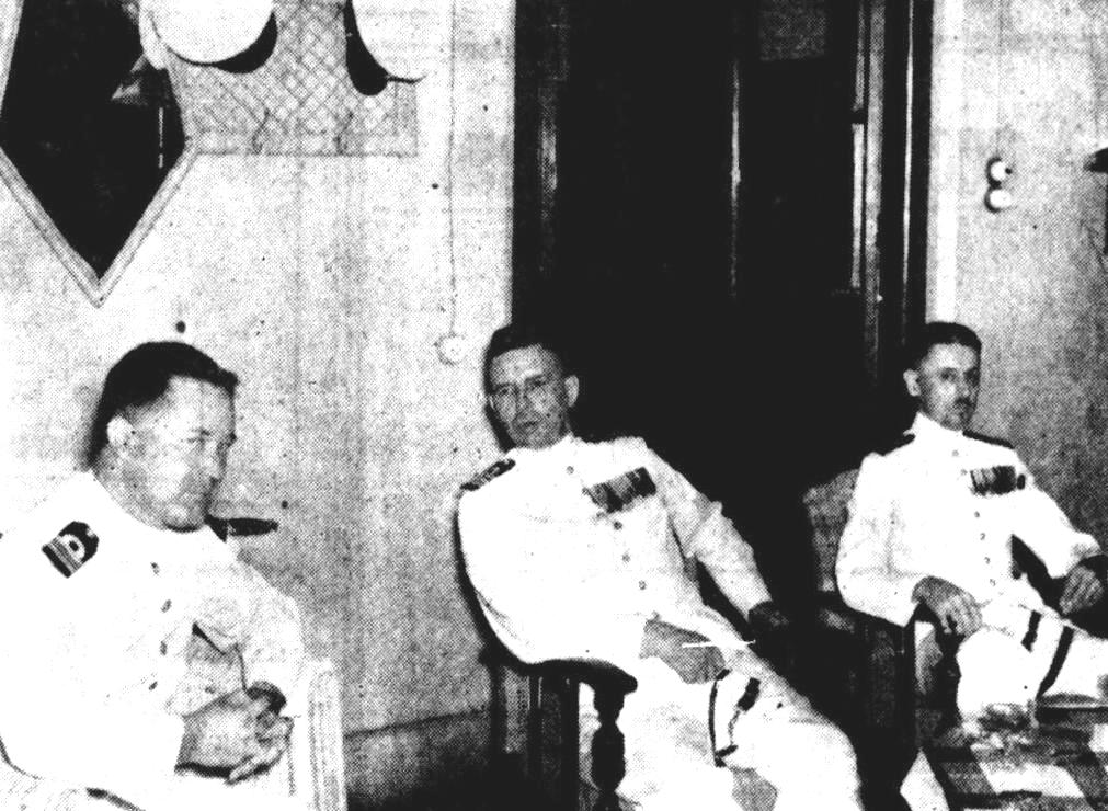 Commando-overdracht: vrnl: Roelofsen, de Bruyne en Peereboom Voller